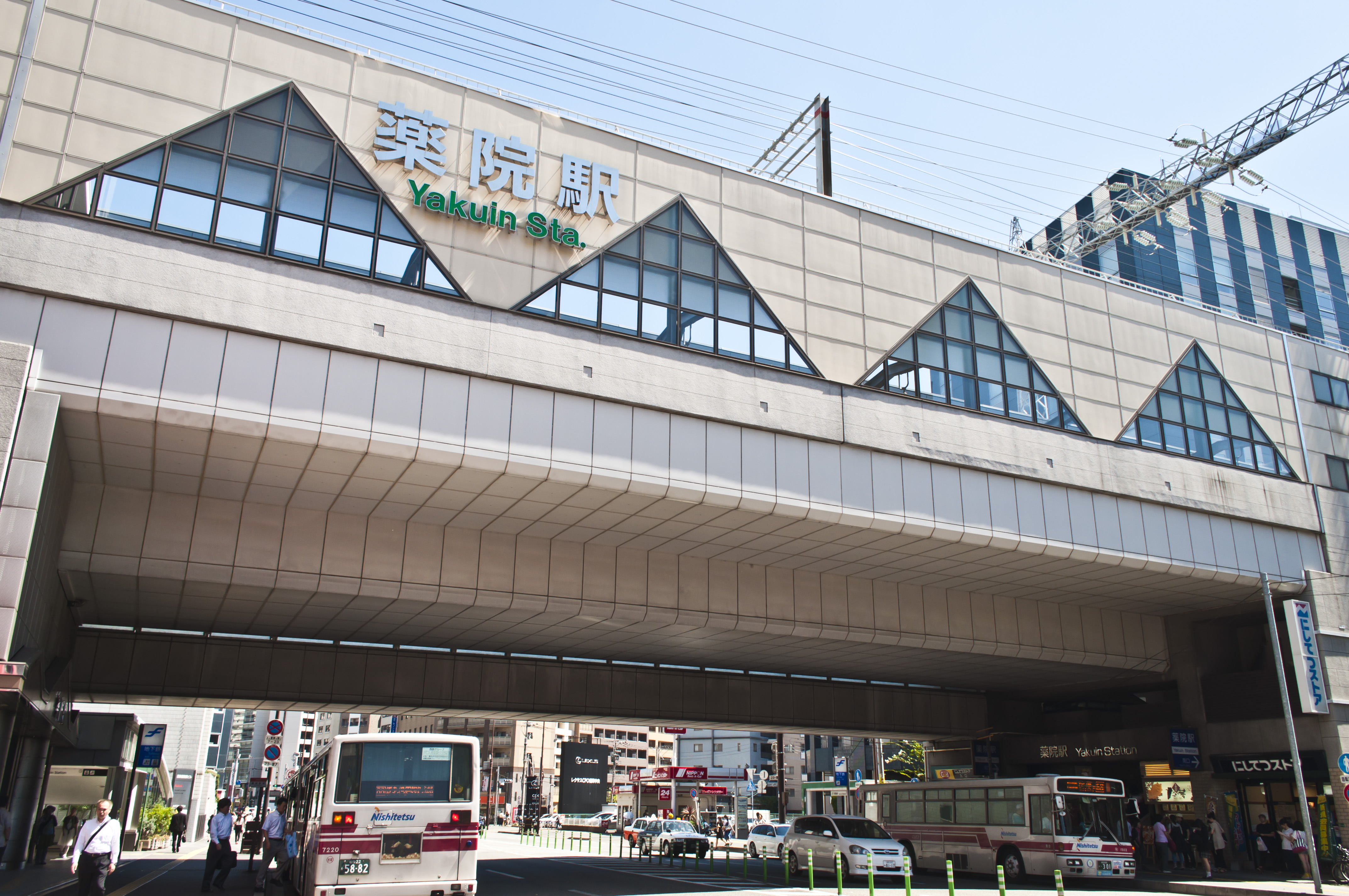 薬院駅。2014年9月撮影